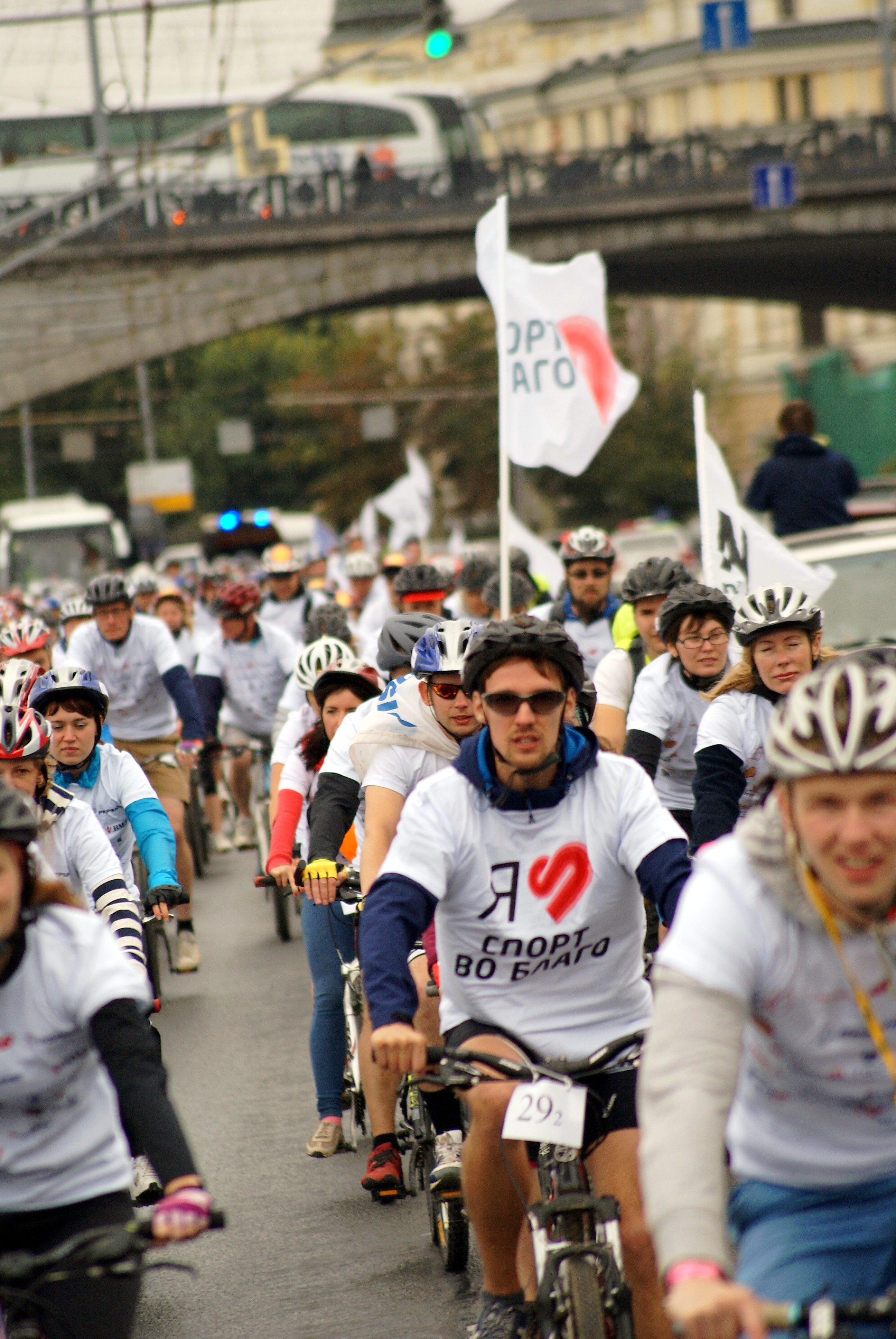 Торжественный финиш велопробега СПОРТ ВО БЛАГО ежегодно собирает несколько сотен участников